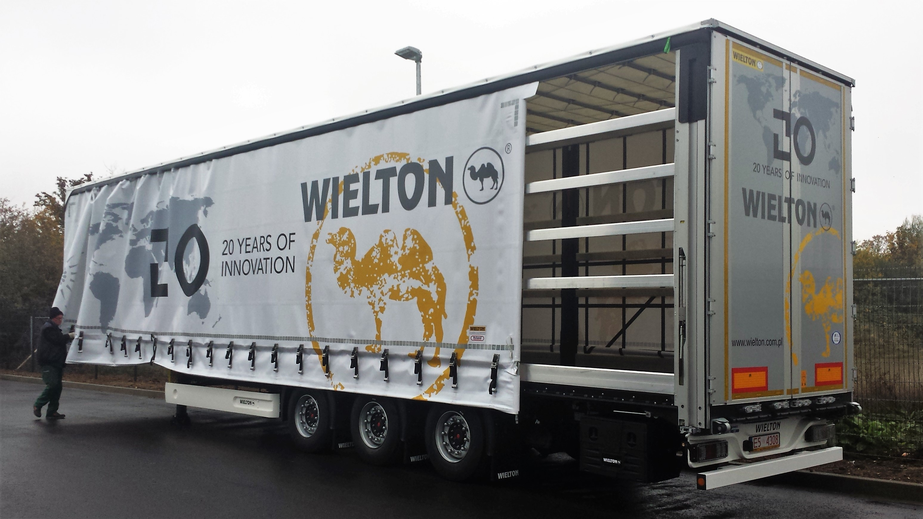 Ein Redakteur des KFZ-Anzeiger beim Testen eines Tautliners des Herstellers Wielton.